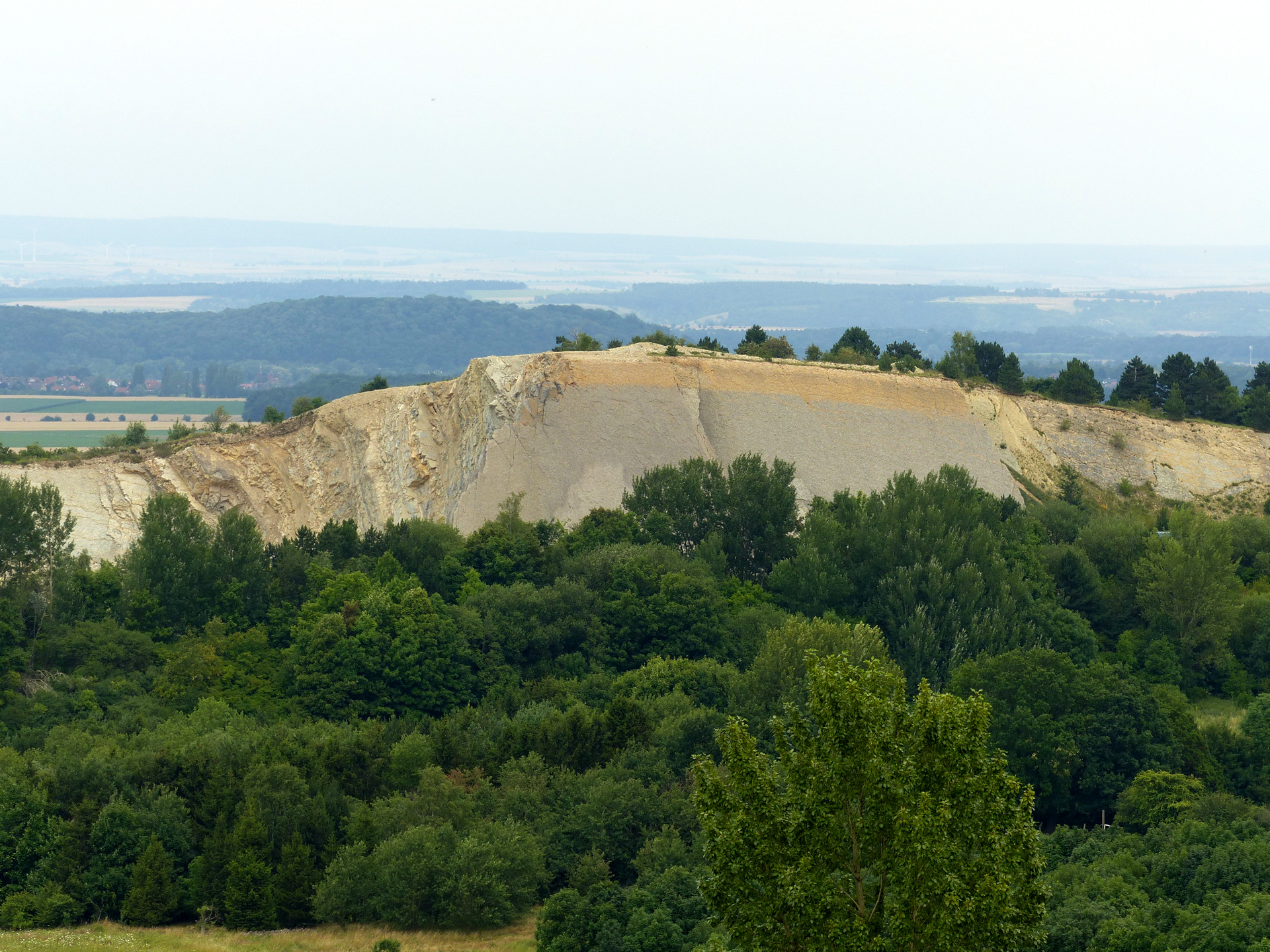 Blick auf das Kalkabbaugebiet "Röseckenbach" vom Harz aus.